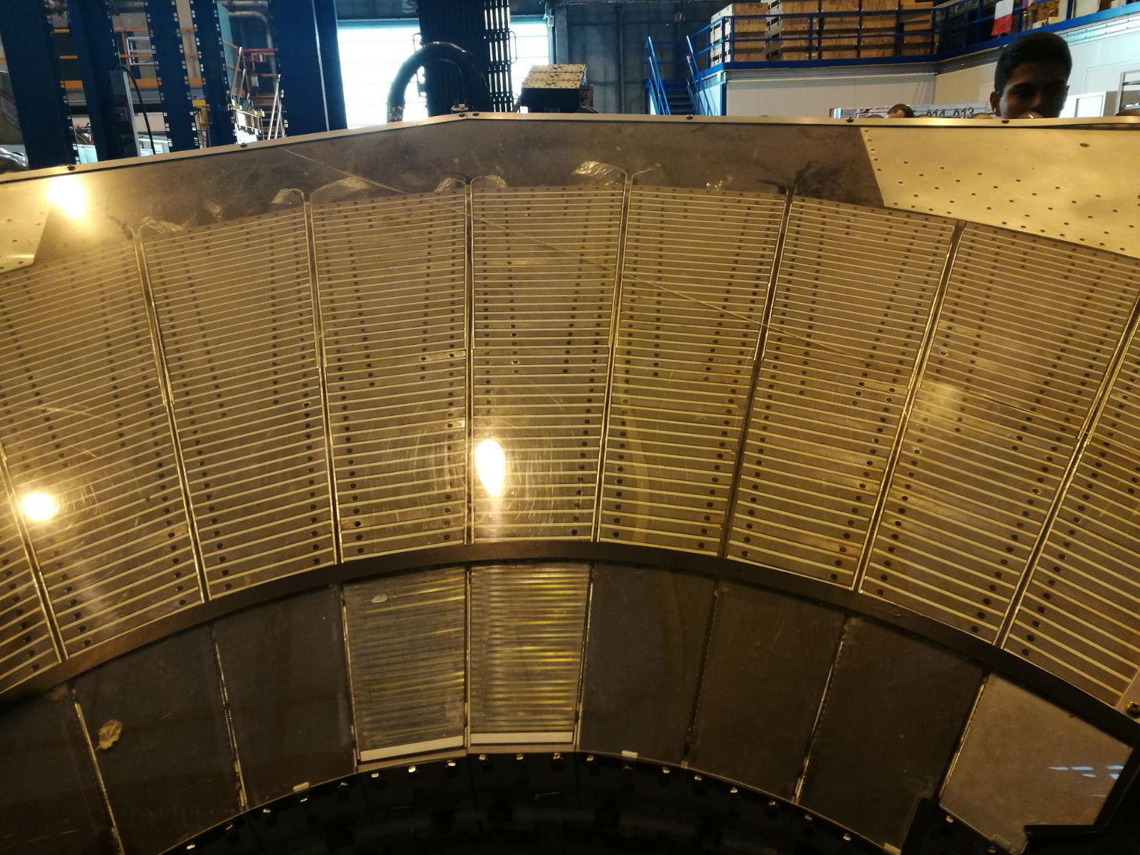 צילום של חלקי קלורימטר ב-CERN